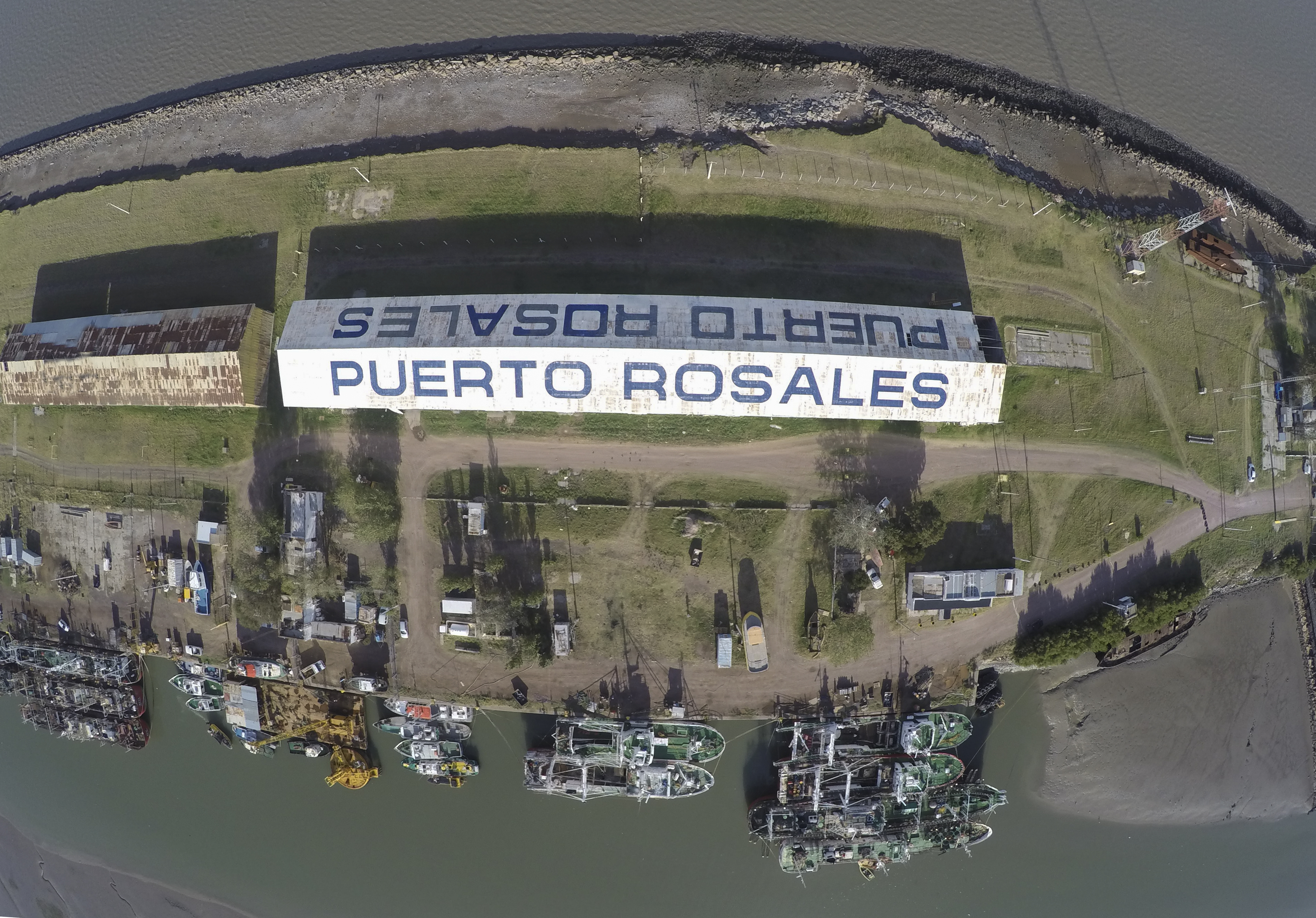 Vista aérea del galpón de Puerto Rosales (Foto: Maurucio Clermont)